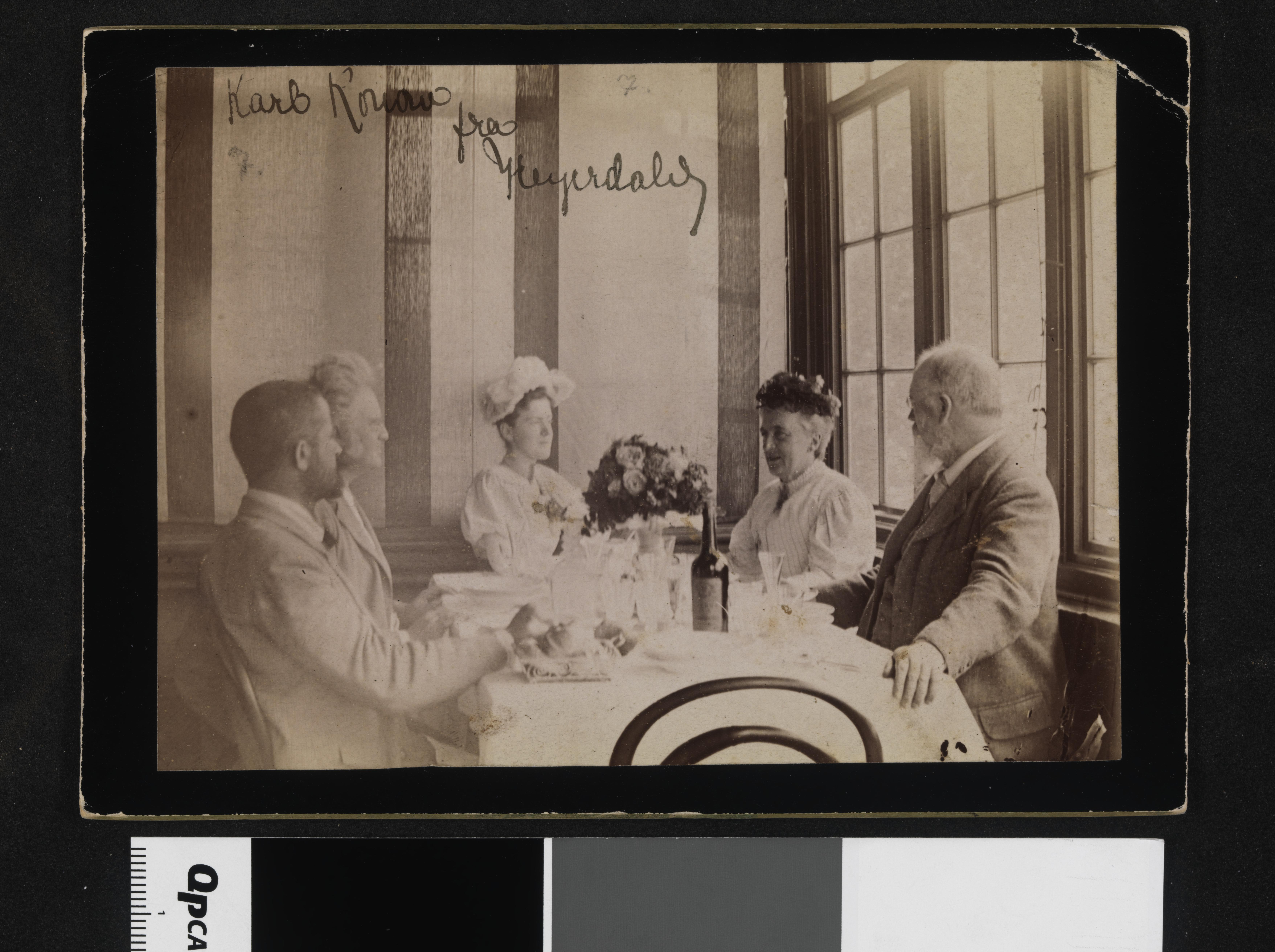 Bildet er hentet fra Nasjonalbibliotekets bildesamling Depicted person: Bjørnson, Bjørnstjerne Depicted person: Sautreau, Dagny Depicted person: Ross, Christian Meyer Depicted person: Konow, Karl Depicted person: Bjørnson, Karoline